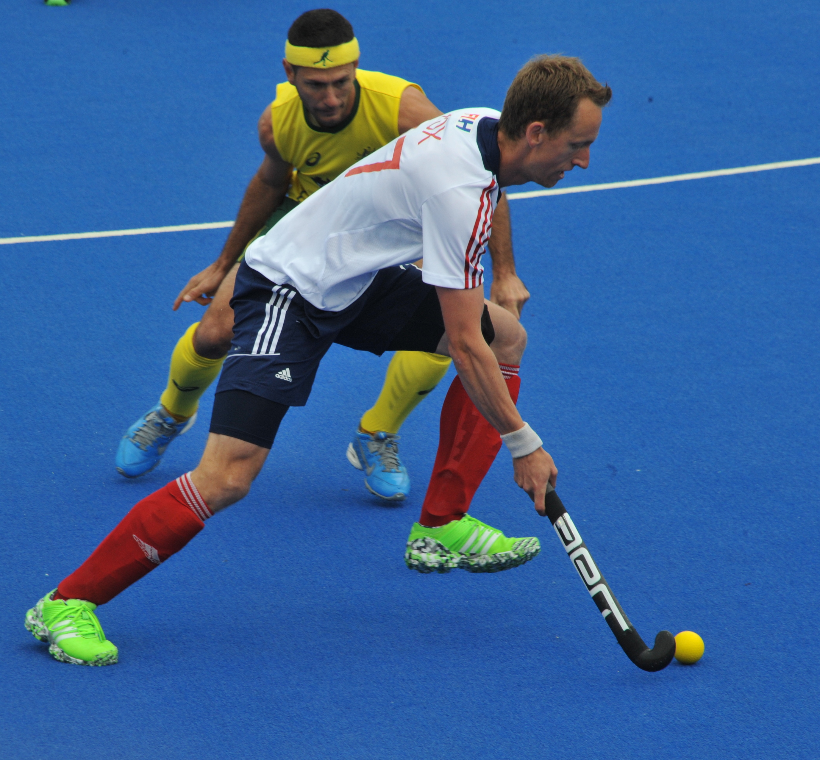 Jamie Dwyer and Dan Fox